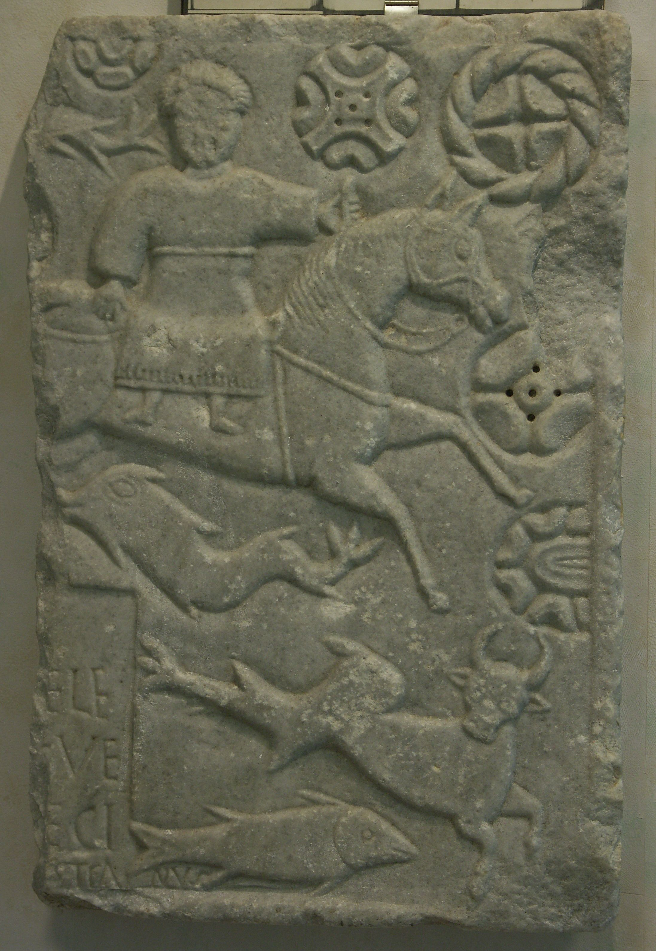 bas-relief gallo-romain en marbre de Saint-Béat représentant la déesse celte Epona.